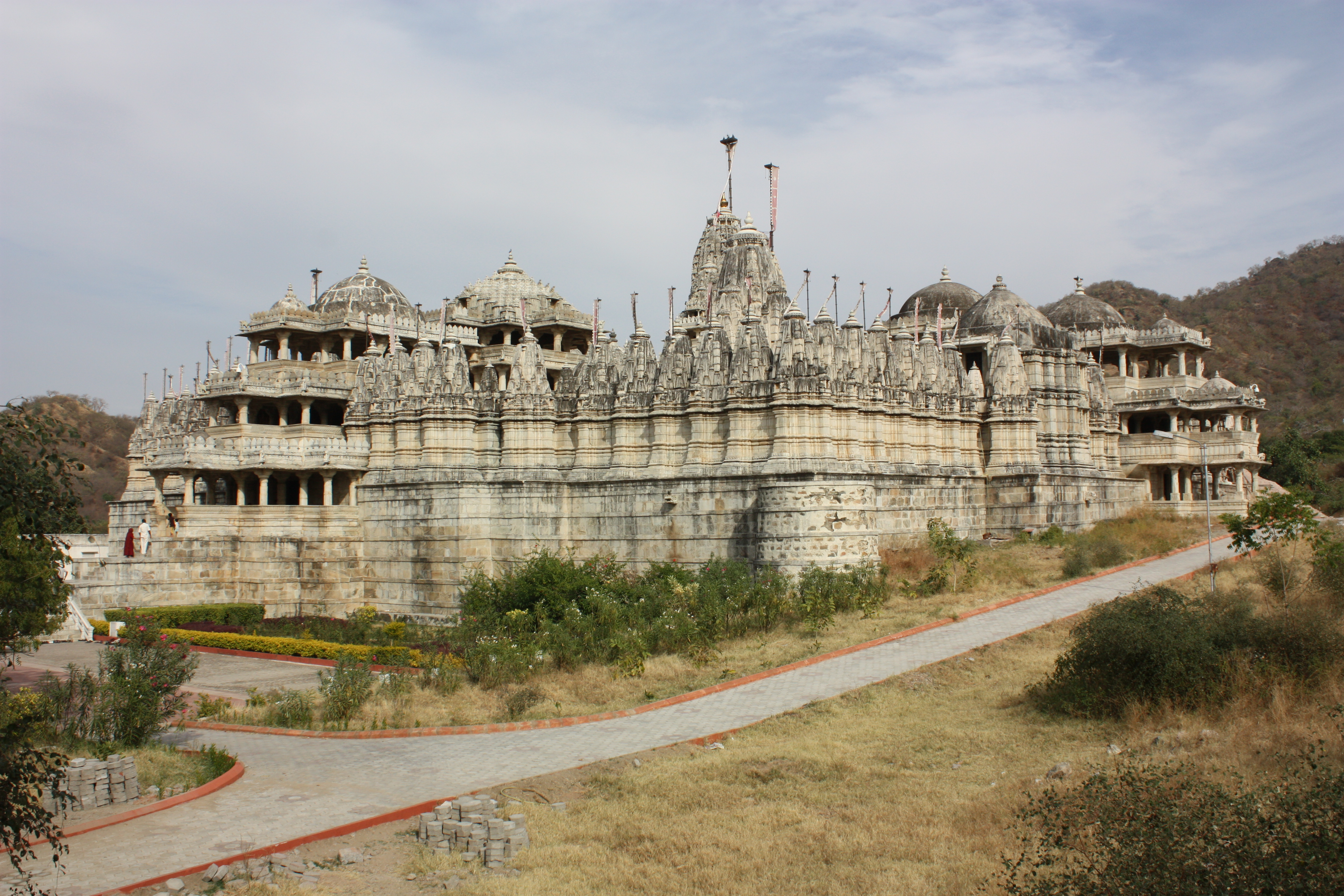 Ranakpur